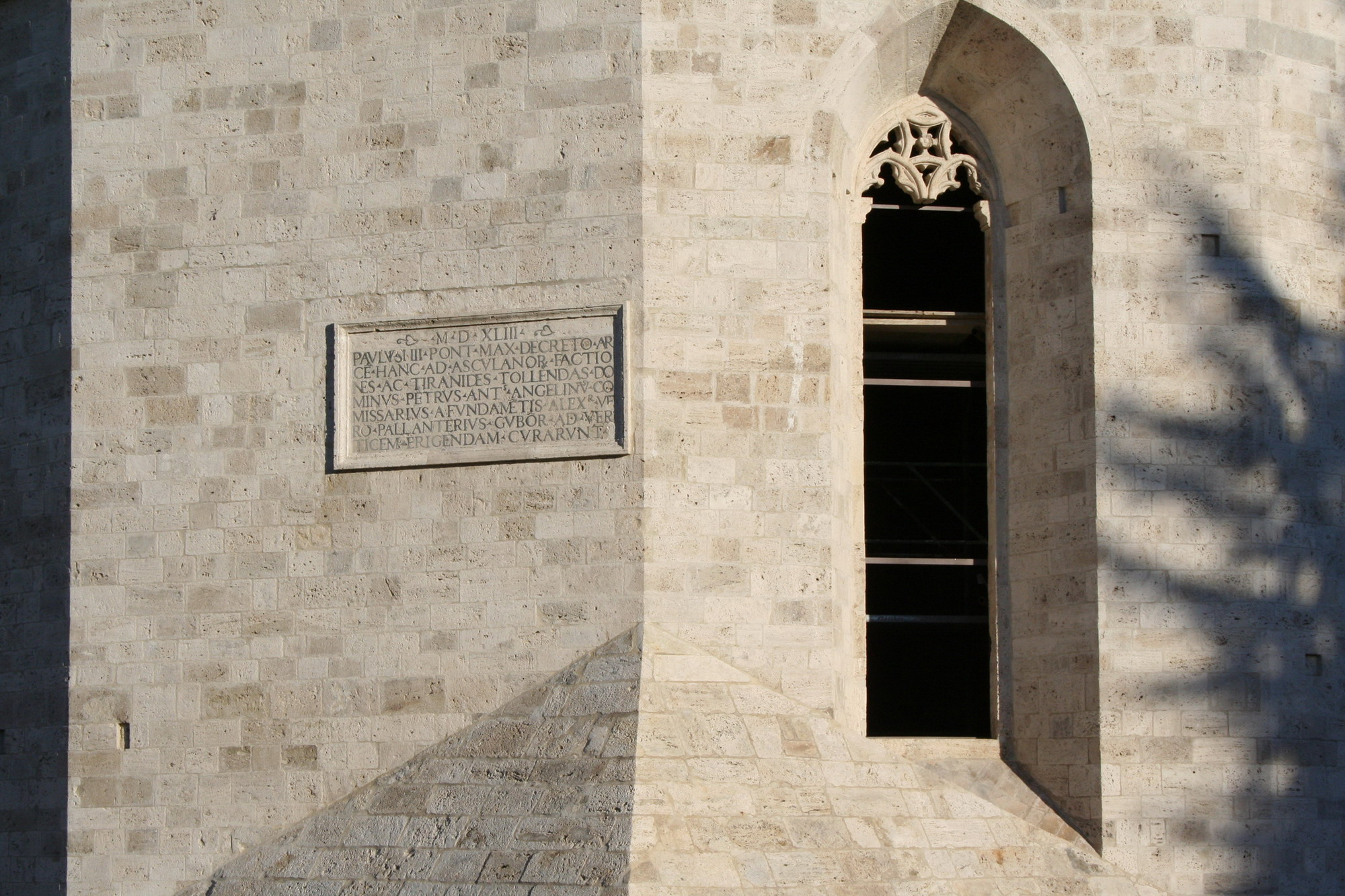 Forte Malatesta, lapide posta dal Commissario Angelini, Ascoli Piceno, esterno giorno, proprio scatto Sibilla.io "Utilizzo concesso" Ticket#2007040410014627 (ticket per le immagini) This file is licensed under Creative Commons 3.0 license